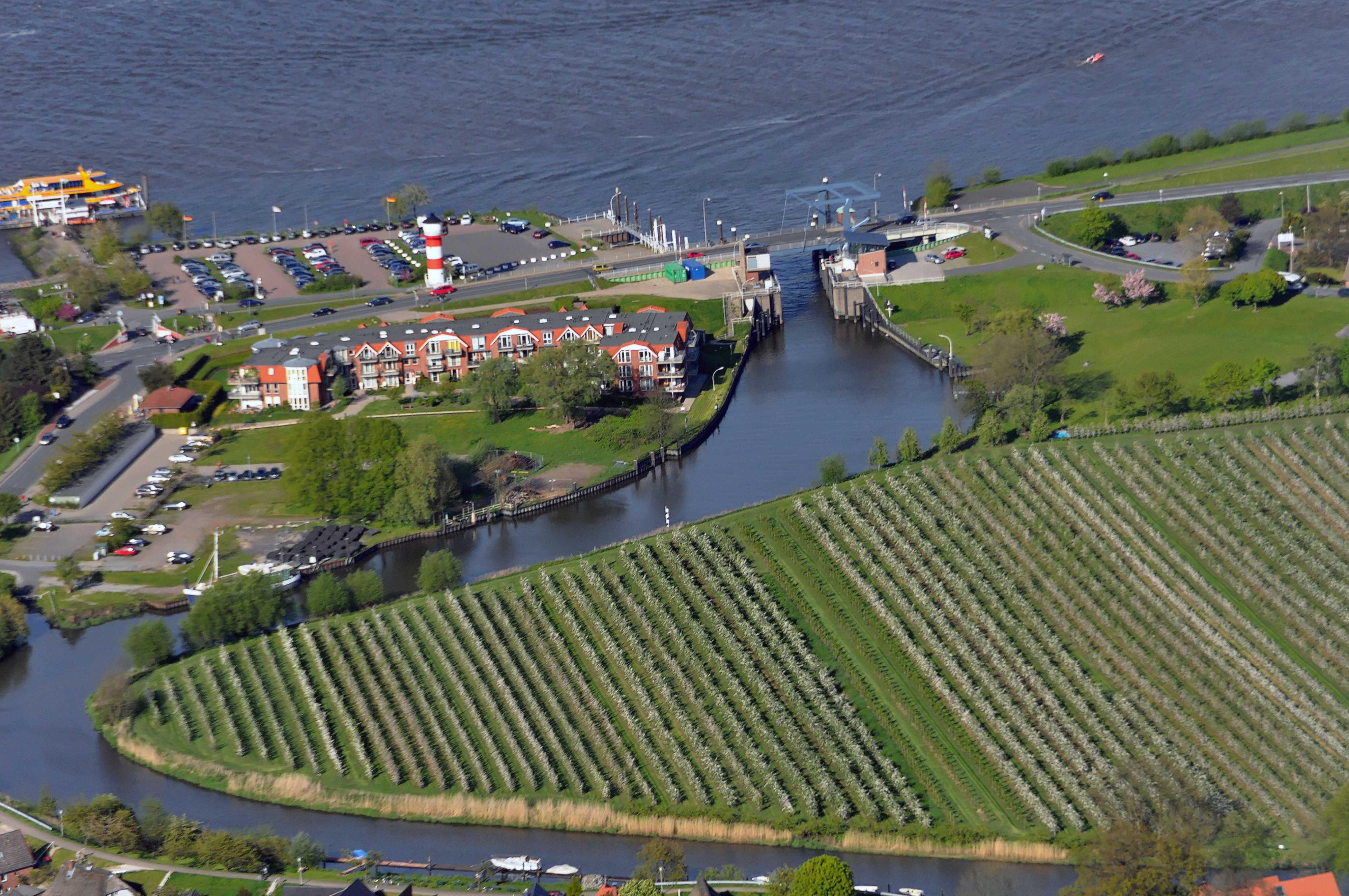 Luftbilder von der Nordseeküste 2012-05